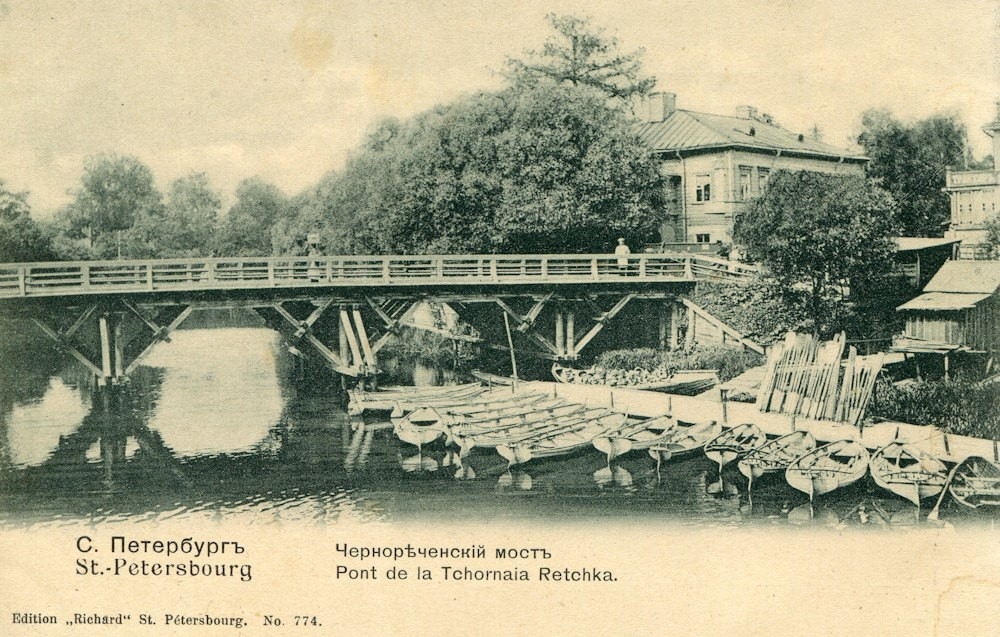 Деревянный Чернореченский мост через Черную речку в Санкт-Петербурге